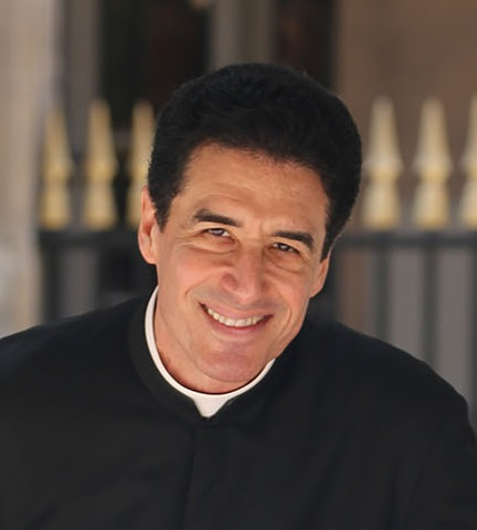 Le Père Michel-Marie Zanotti-Sorkine à Paris en 2016.